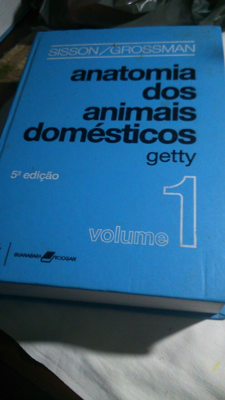 Imagem do Livro Sisson